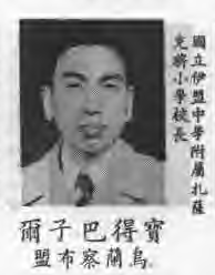 第一屆國民大會蒙古烏蘭察布盟代表寶得巴子爾